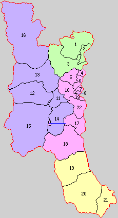 山梨県南巨摩郡の町村。